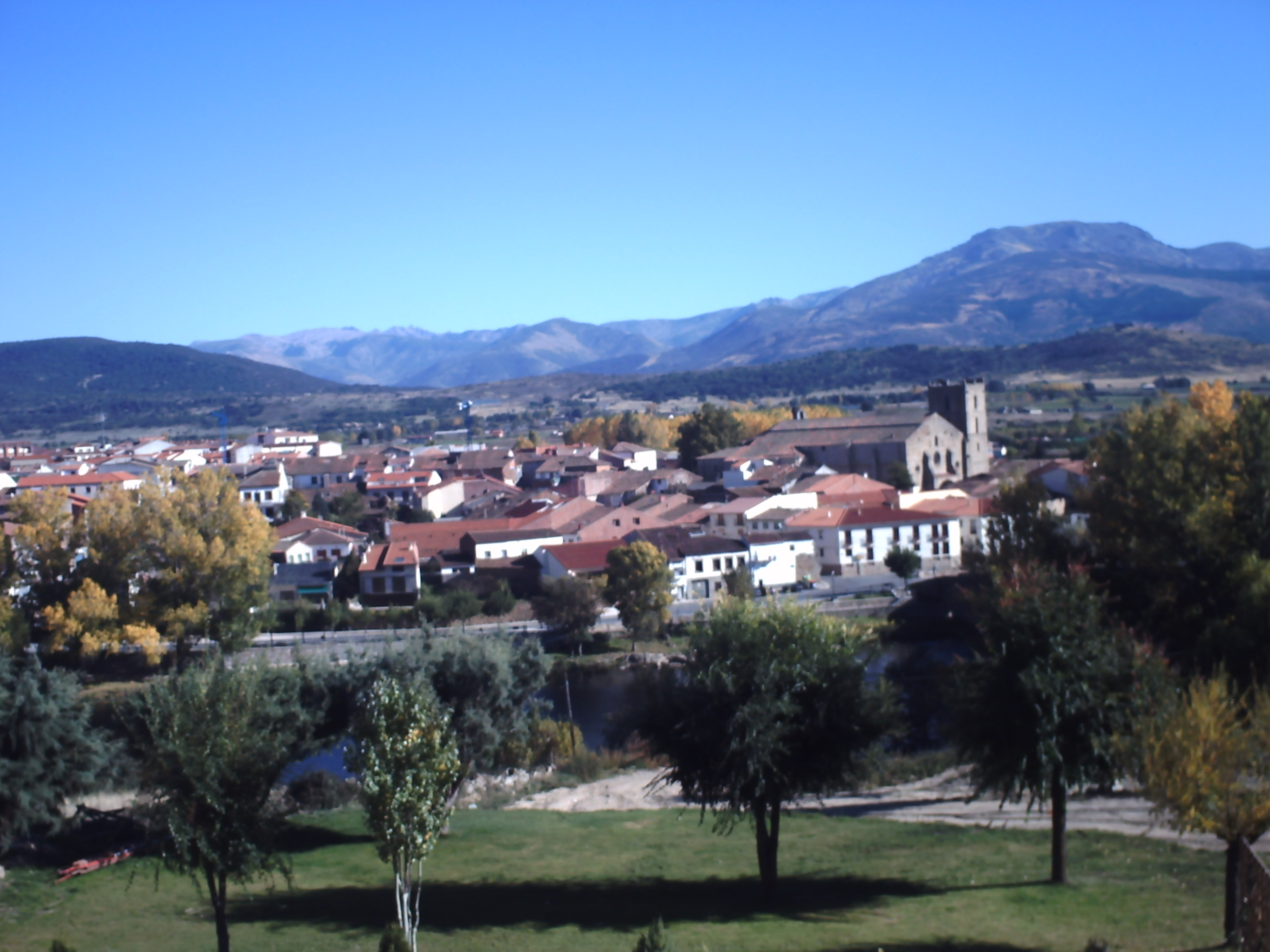 Vista de Barco de Avila